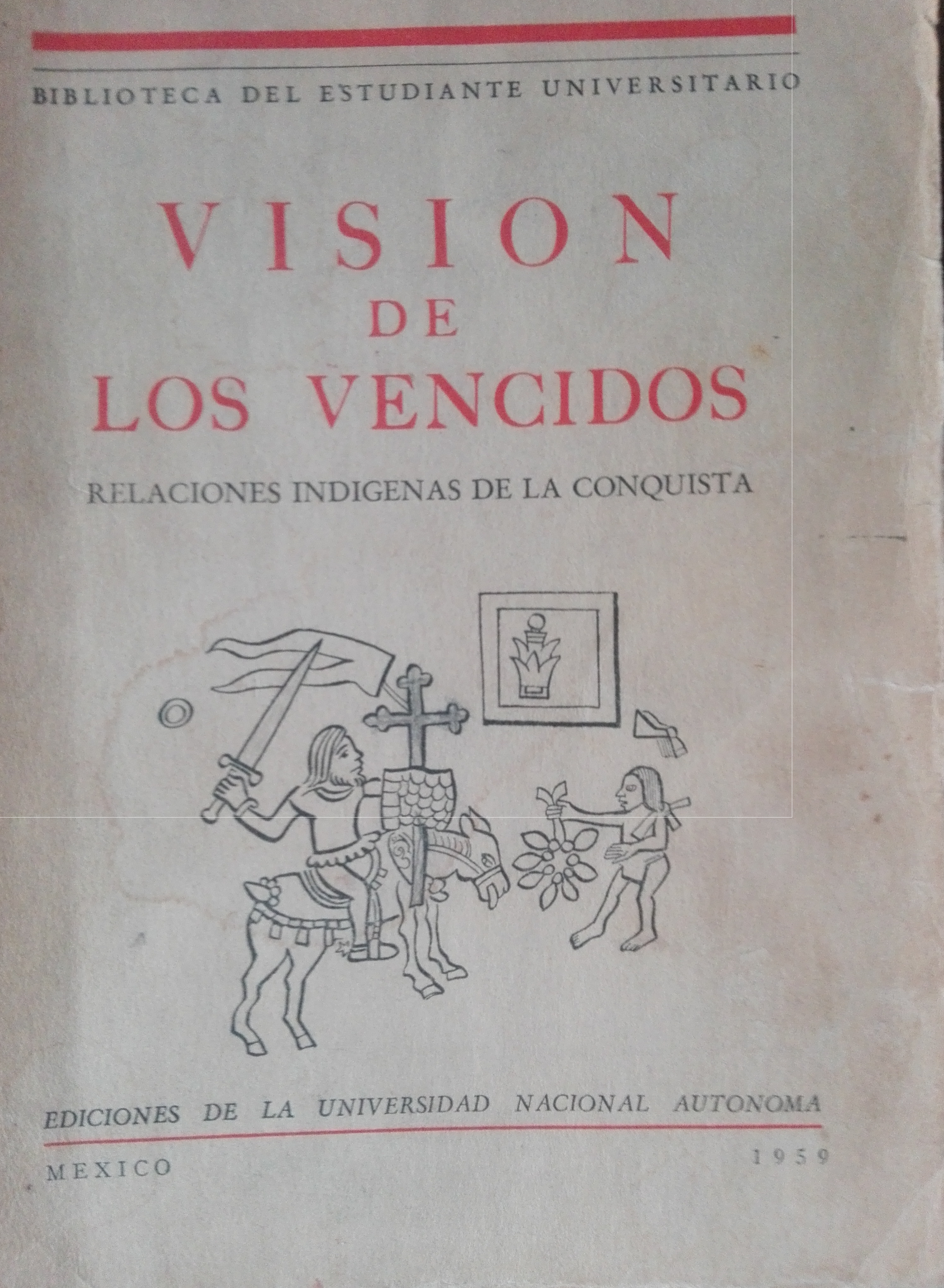 Portada de "La visión de los vencidos" 1ra Edición; Ed. UNAM; 1959; Colección: Biblioteca del Estudiante Universitario.